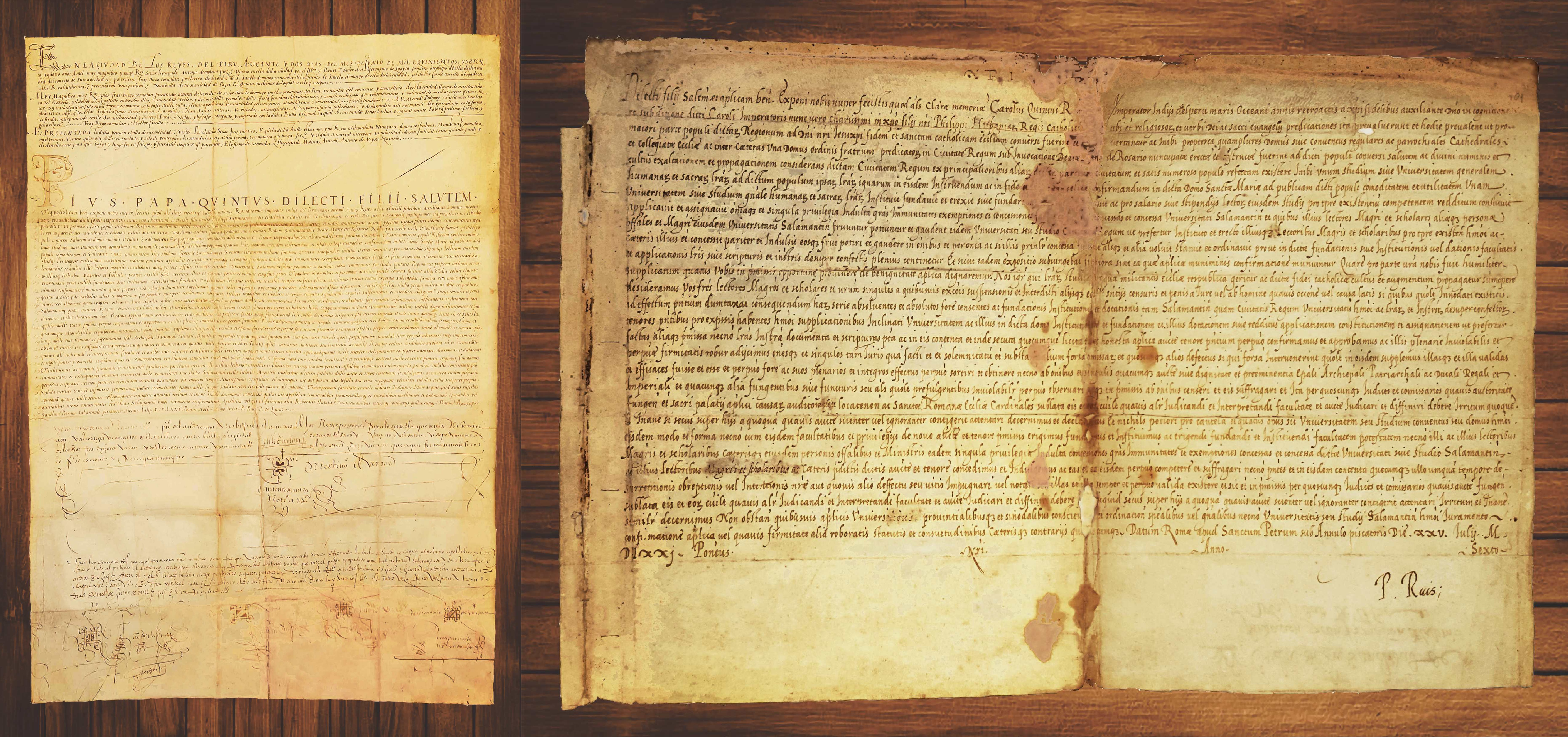 UNMSM Bula Papal Exponi Nobis o Bula de Confirmación de Fundación (Breve Papal)